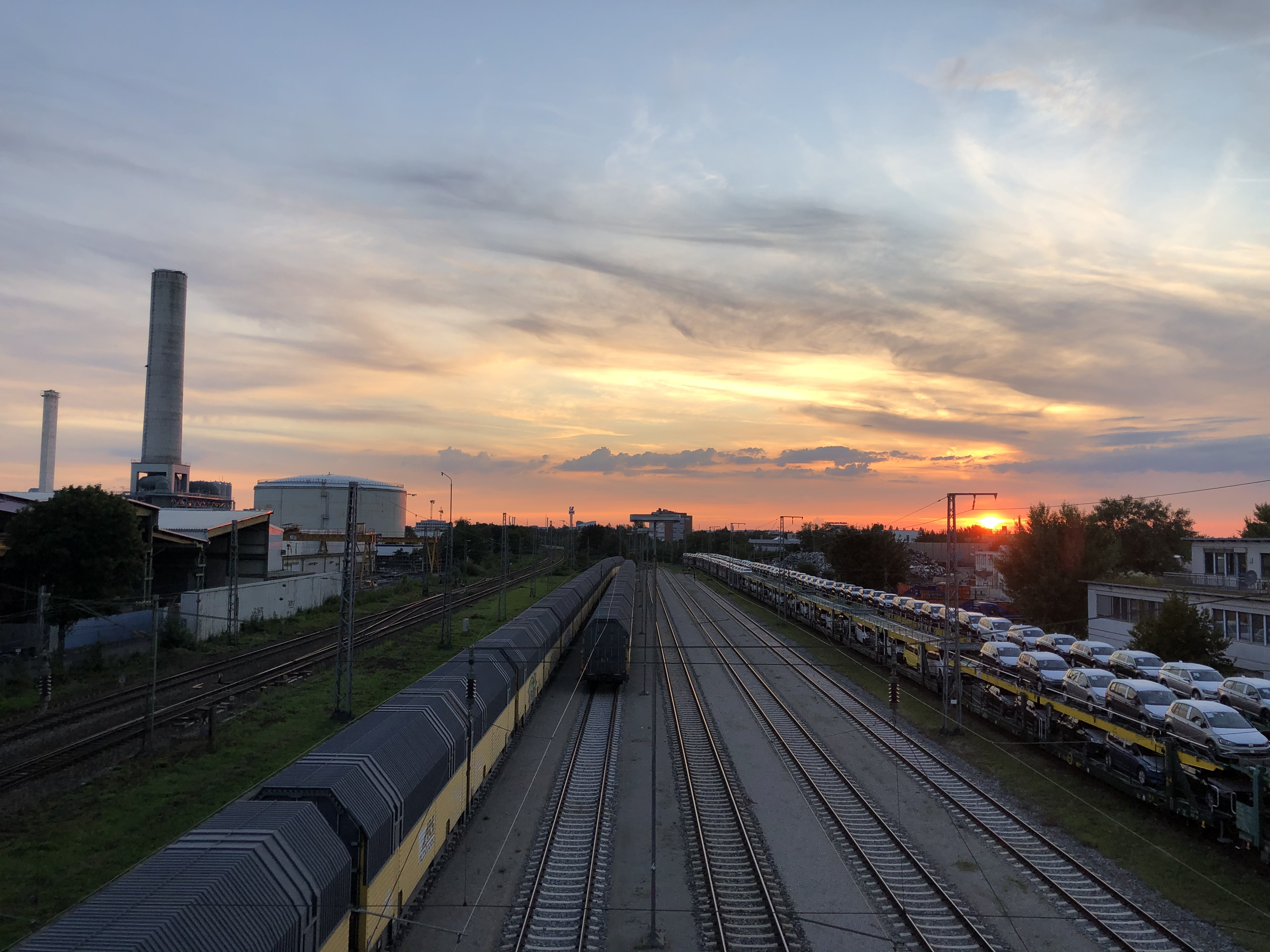 Nordring Freimann vom Güterbahnhof Freimann nach Westen